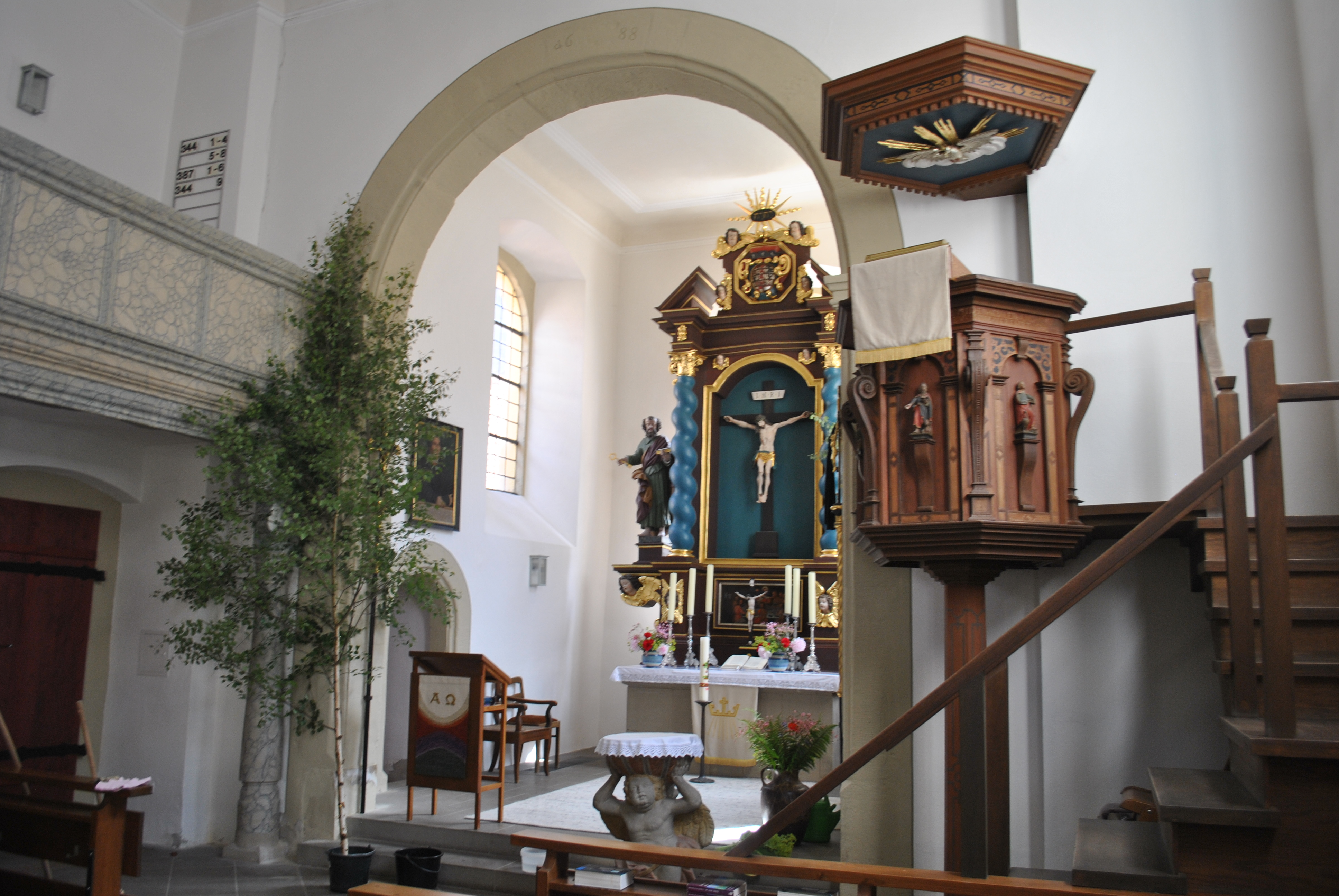 Evangelisch-lutherische Pfarrkirche St. Bonifazius Chorturmkirche innerhalb einer Kirchenburganlage, 1688–1690; mit Ausstattung